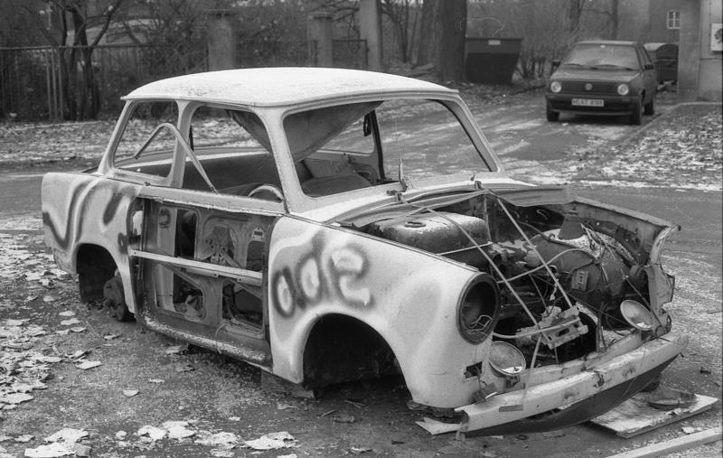 30.11.1990 [Serie] Wahlwerbung der Parteien für die Wahl zum ersten gesamtdeutschen Bundestag in Leipzig.